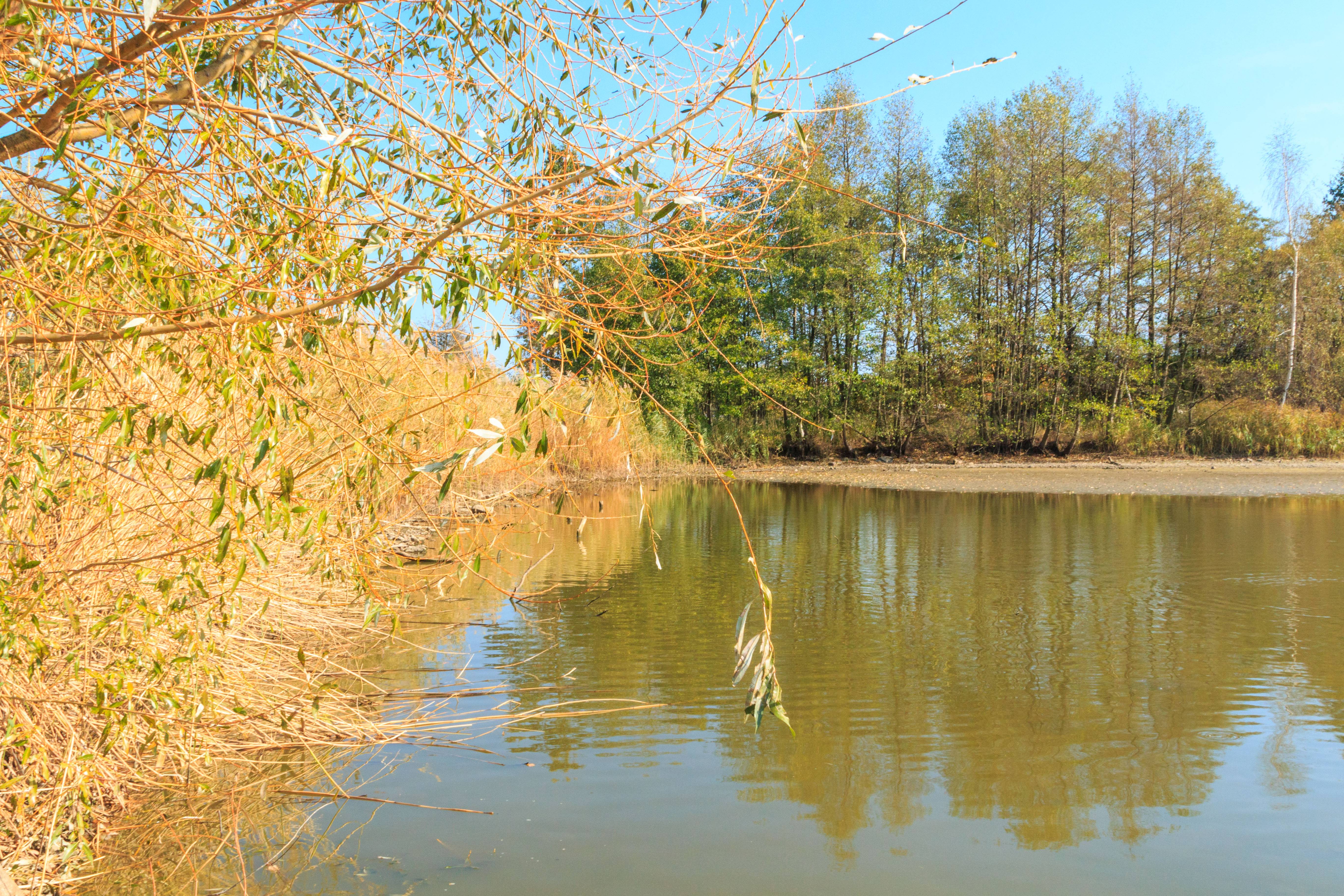 Kovárenský rybník u Miřetic Project: Vodstvo. Ticket: 1617.